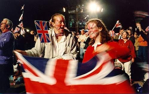 Proms in the Park. Die erste "Proms in the Park" Veranstaltung 1996. 28.000 Besucher feierten den Abschluss der Promenadenkonzerte im Londoner Hyde Park zeitgleich zur "Last Night of the Proms" der Royal Albert Hall. Foto: Jochen Magnus